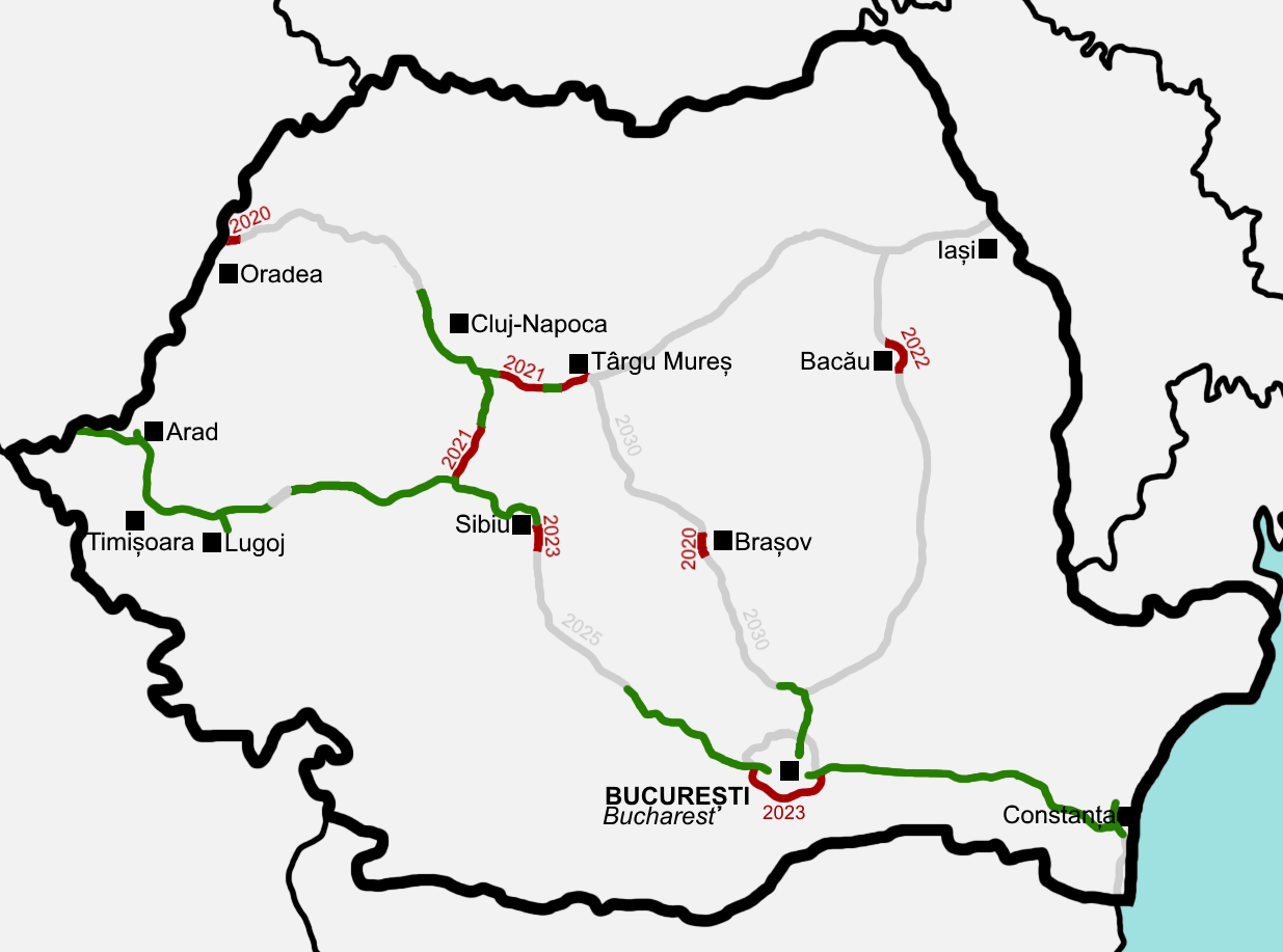 Cu verde sunt autostrăzile finalizate, deschise traficului public. Cu grena sunt autostrăzile în lucru. Cu gri sunt traseele autostrăzilor planificate. Atât la traseele gri și grena, se află termenul de finalizare estimat.